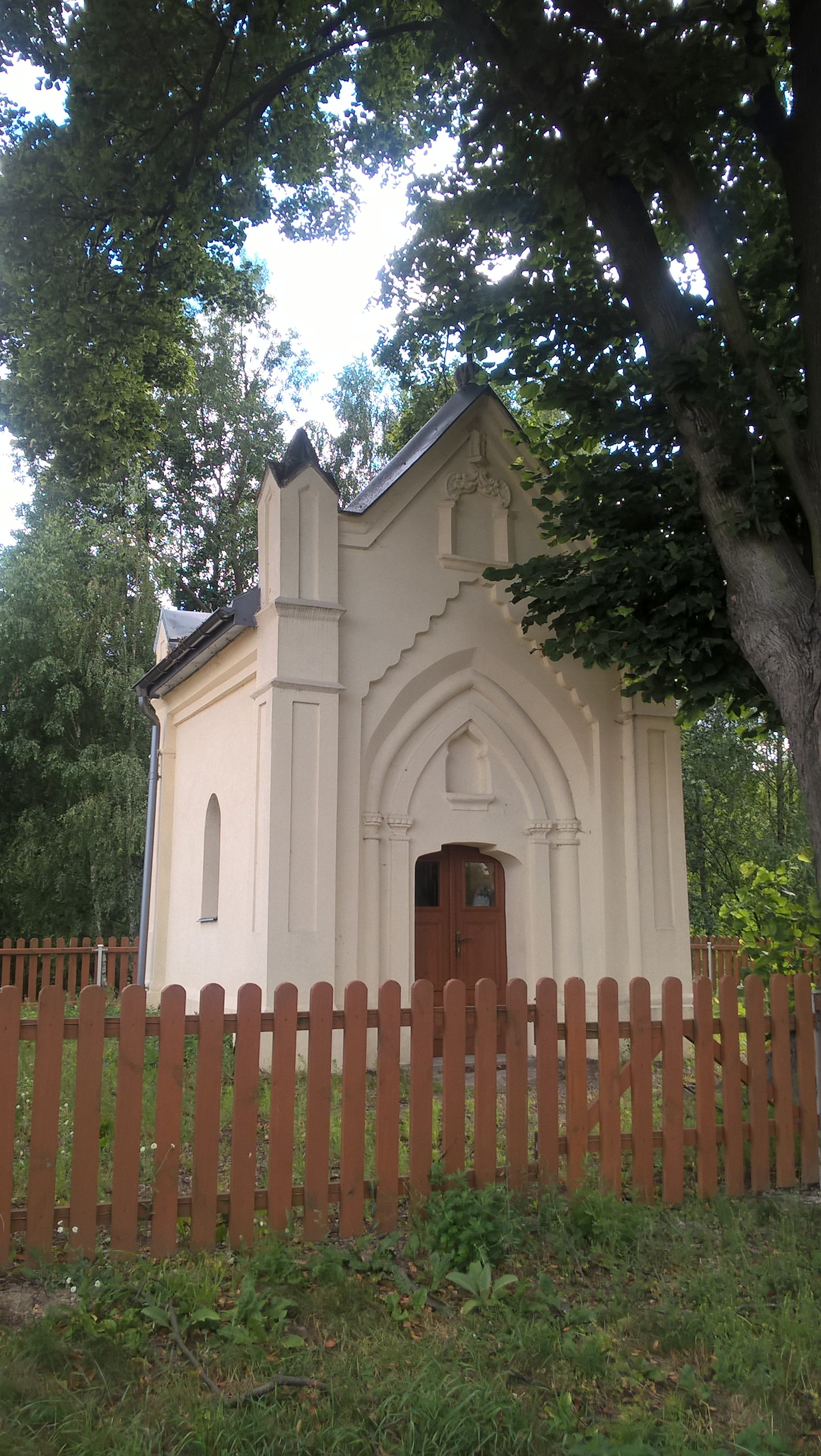 Kaplica w Czarnymstoku